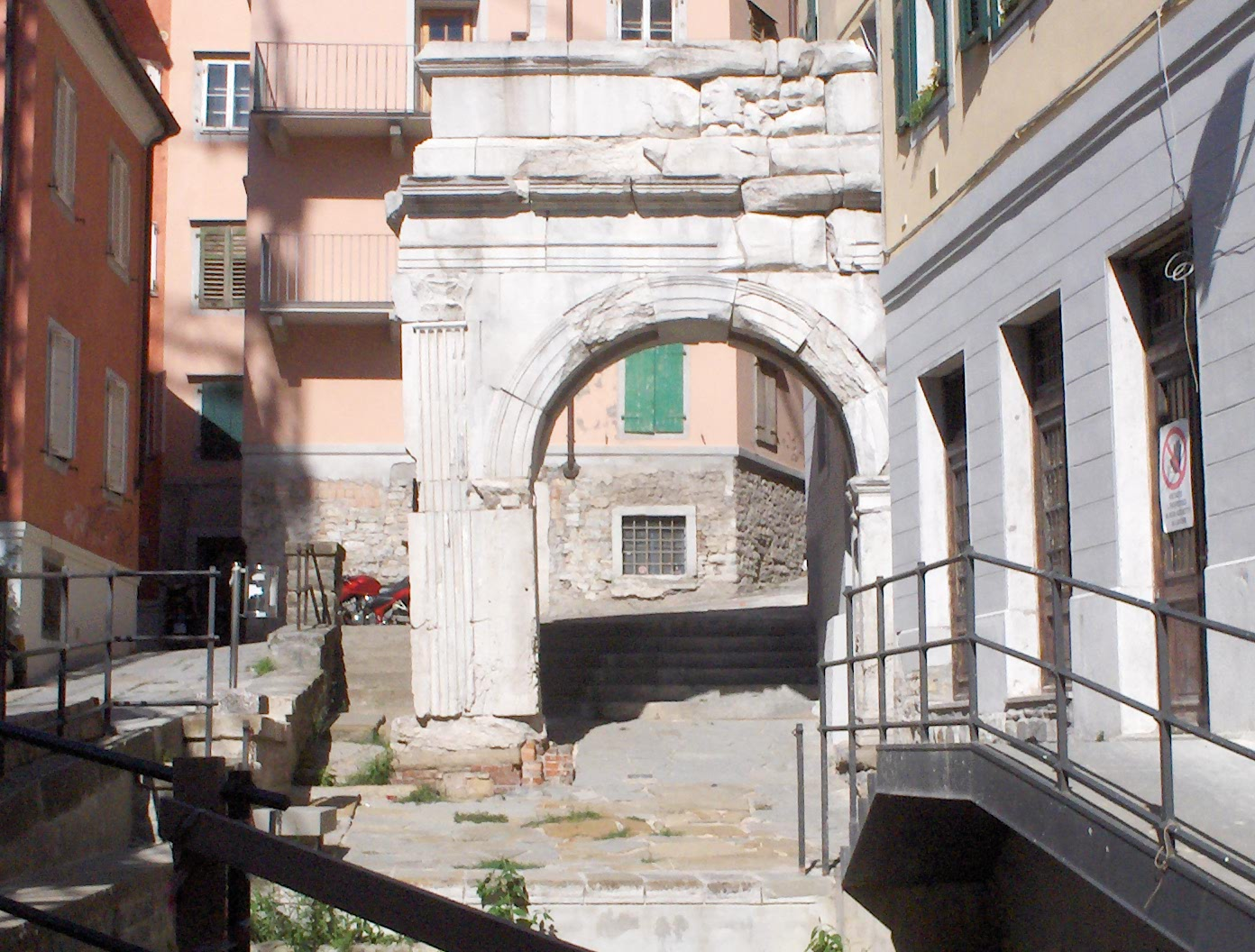 Arco di Riccardo, (Roman arch - 33 B.C.), Colle di San Giusto, Trieste